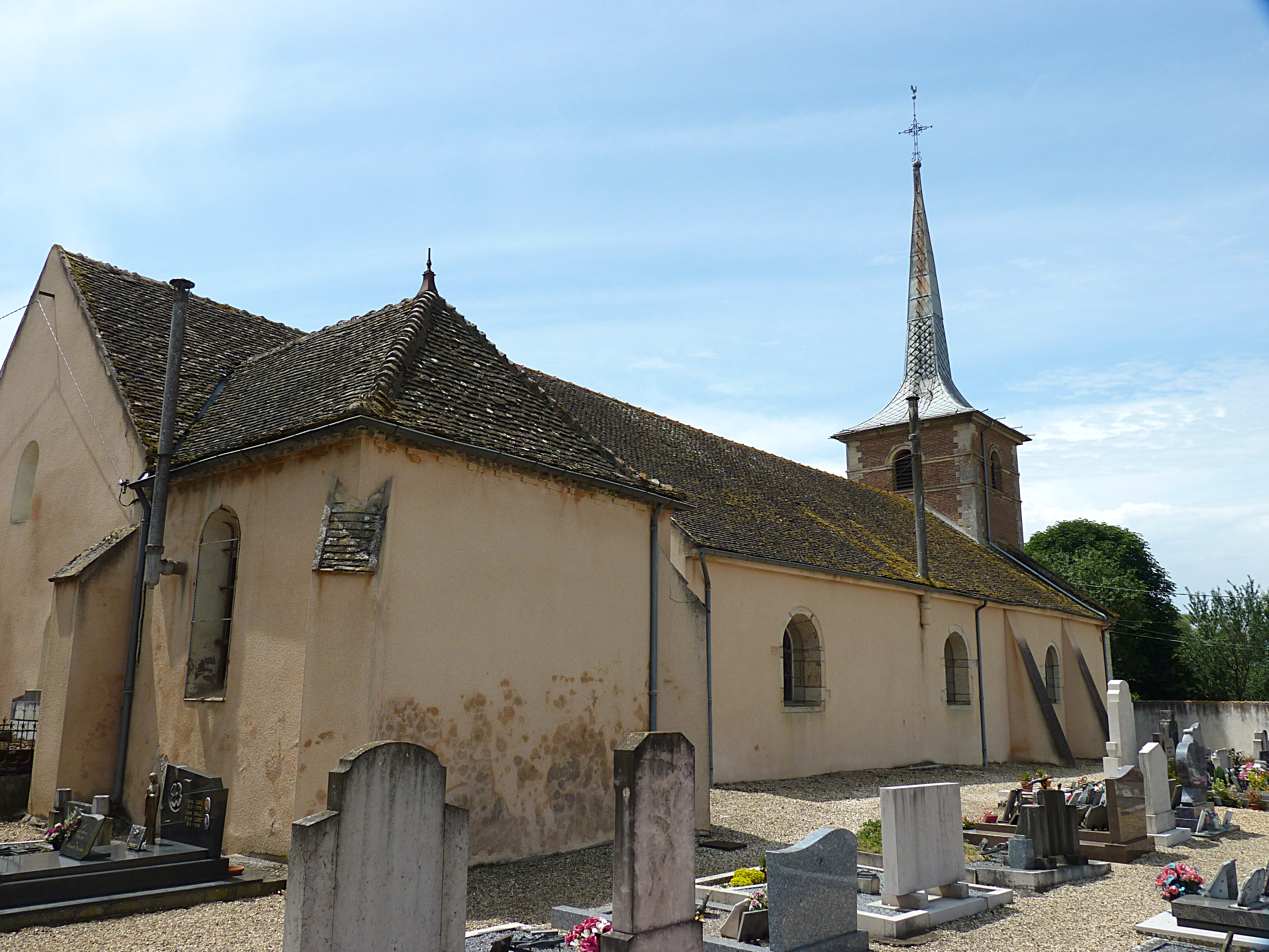 Església, Chamblanc (Costa d'Or, Borgonya, França)